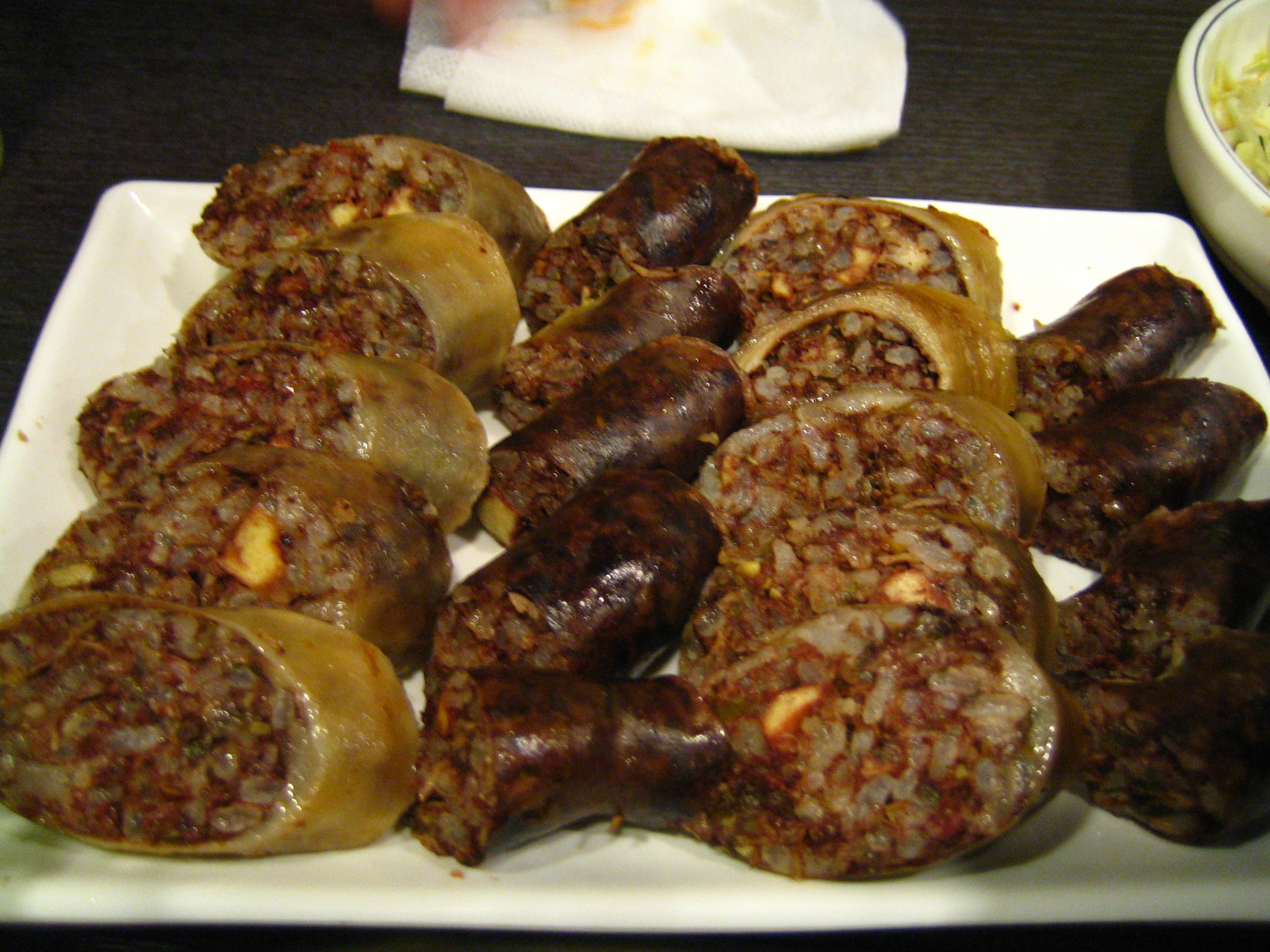 순대, sundae, スンデ